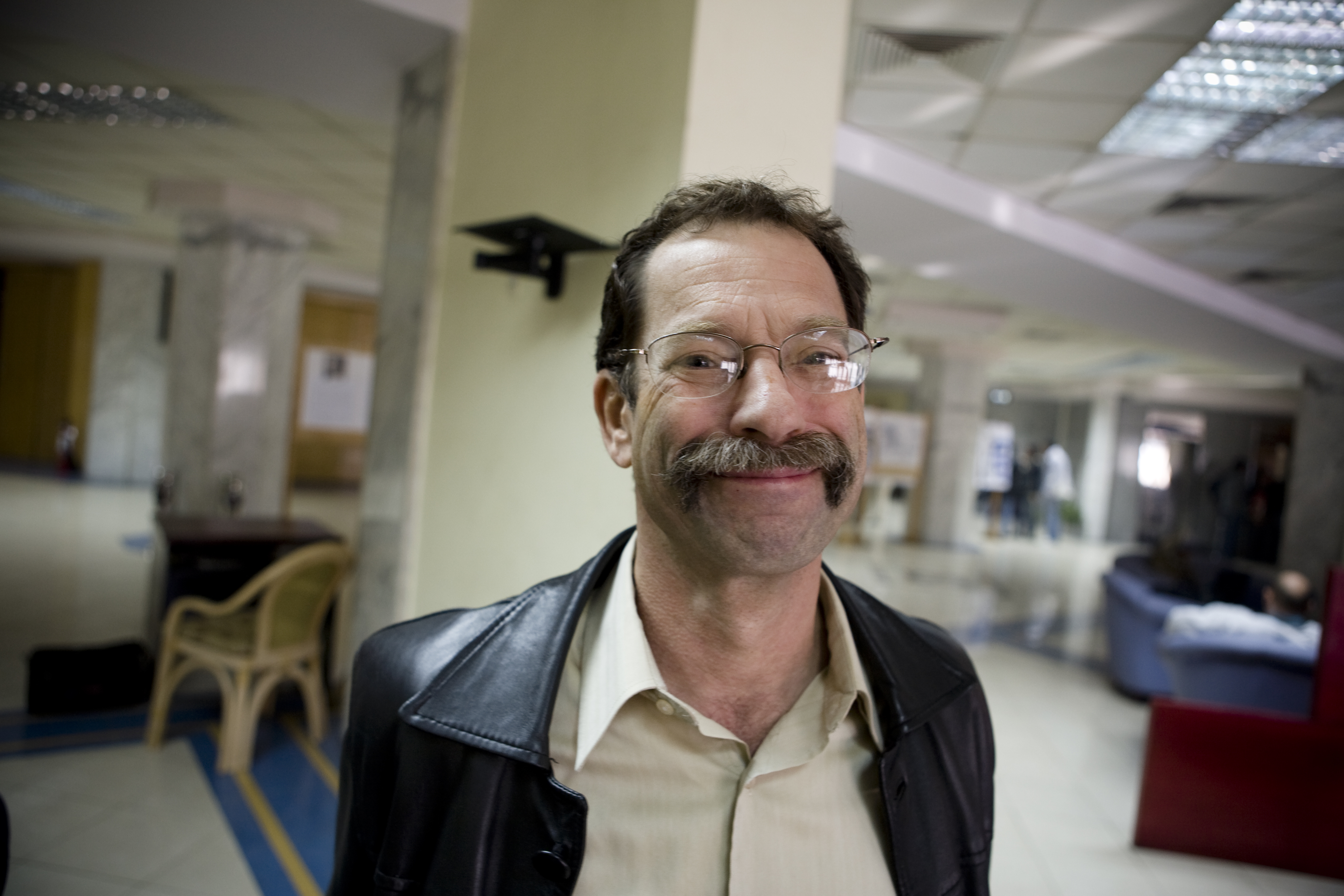 Photo by Hossam el-Hamalawy تصوير حسام الحملاوي